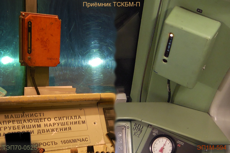 Приёмник сигналов ТСКБМ-П телемеханической системы контроля бдительности машиниста